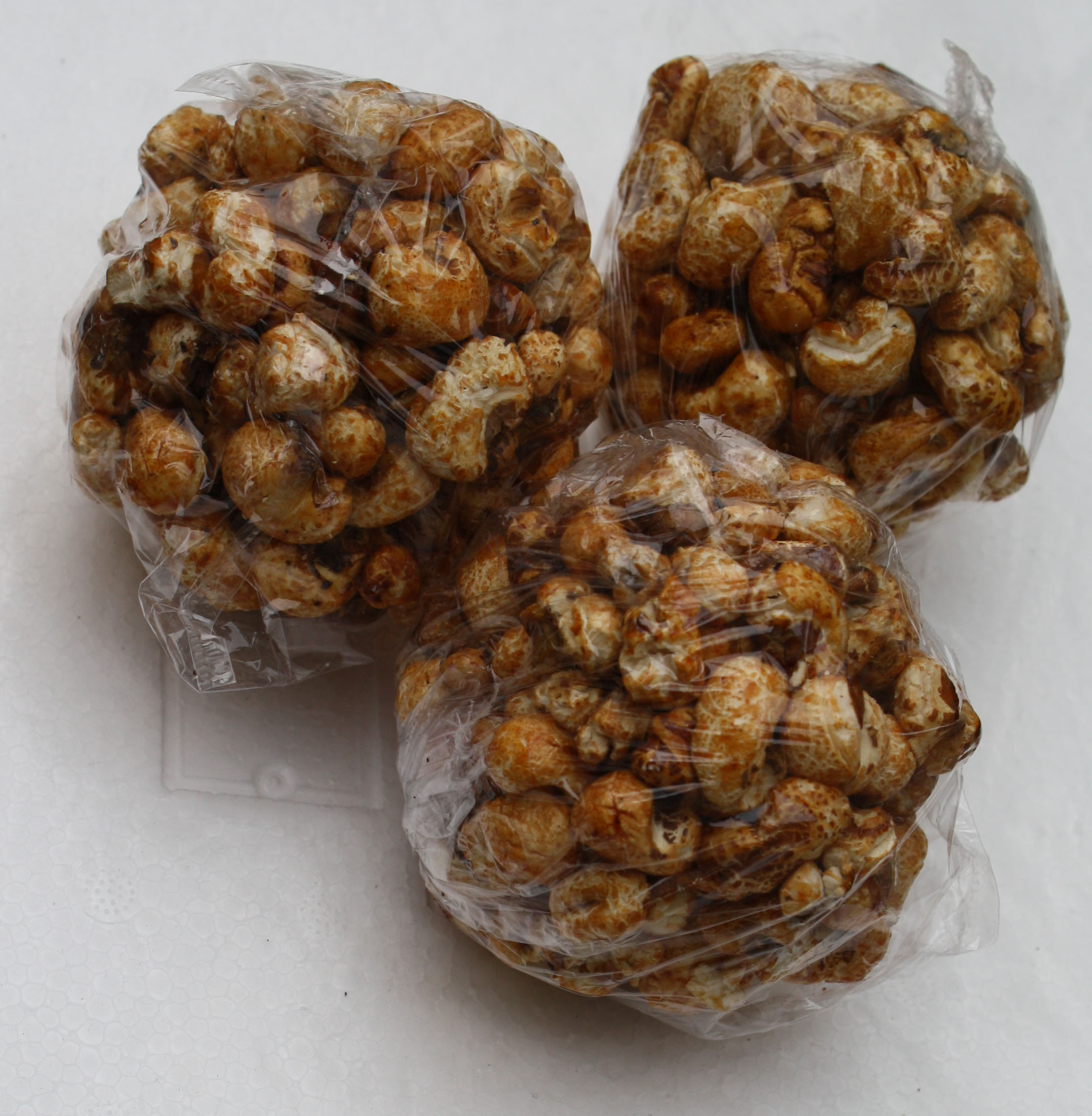 Brondong salah satu jajanan yang asalnya dari Jawa Tengah Indonesia dan memakai bahan utamanya adalah jagung.